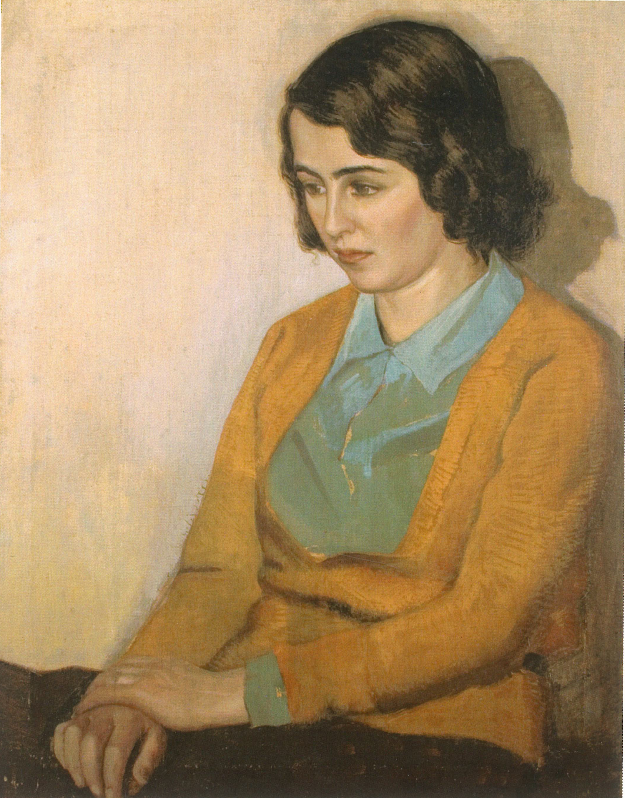 Un dipinto del pittore fiorentino Federigo Angeli, 1933. Tecnica mista su cartone 56x72